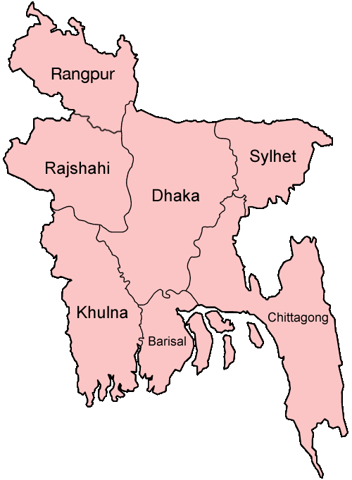 Divisiones de Bangladesh Map of the divisions of Bangladesh in English. Made by User:Golbez.